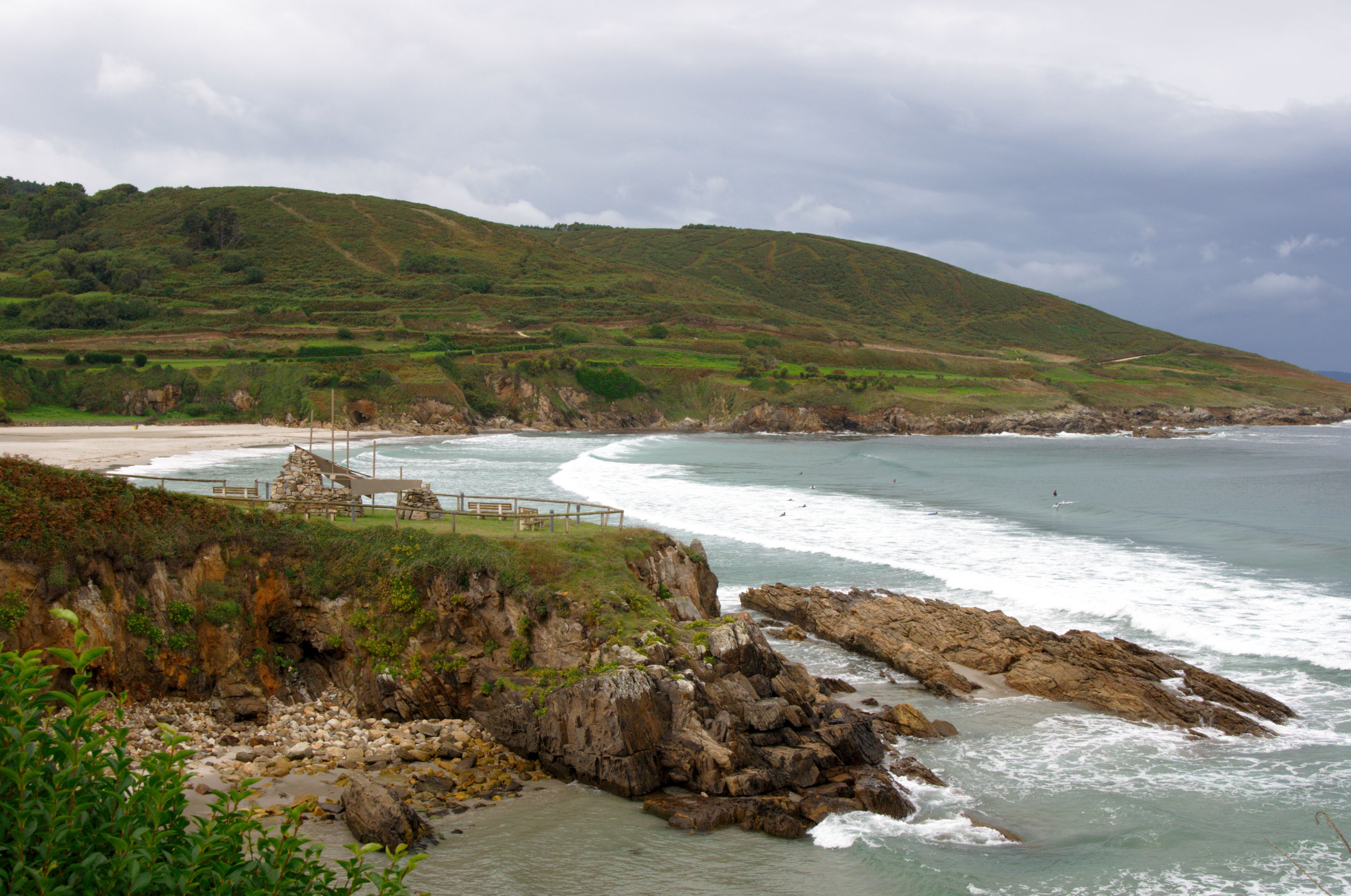 Caión, la playa